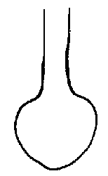 gambo bulboso turbinato